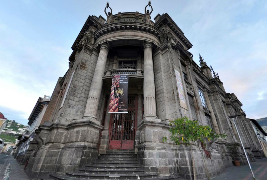 Antiguo edificio del Banco Central del Ecuador (1924), hoy ocupado por el Museo Numismático nacional, perteneciente a la misma institución.